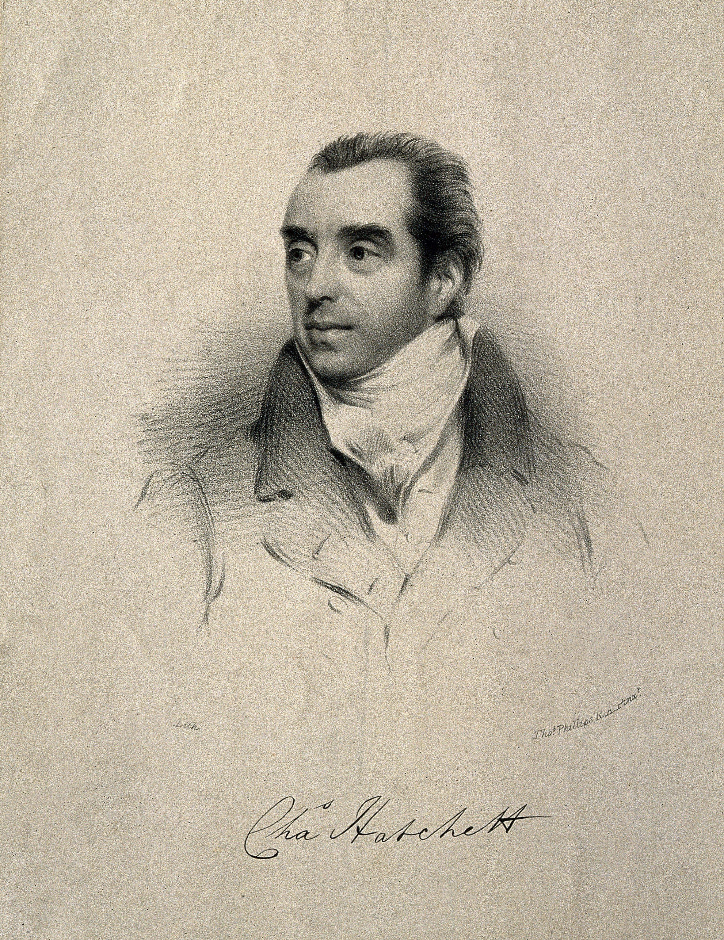 Genre/Technique: Portrait prints. Lithographs. Subject name: Hatchett, Charles, 1765?-1847.